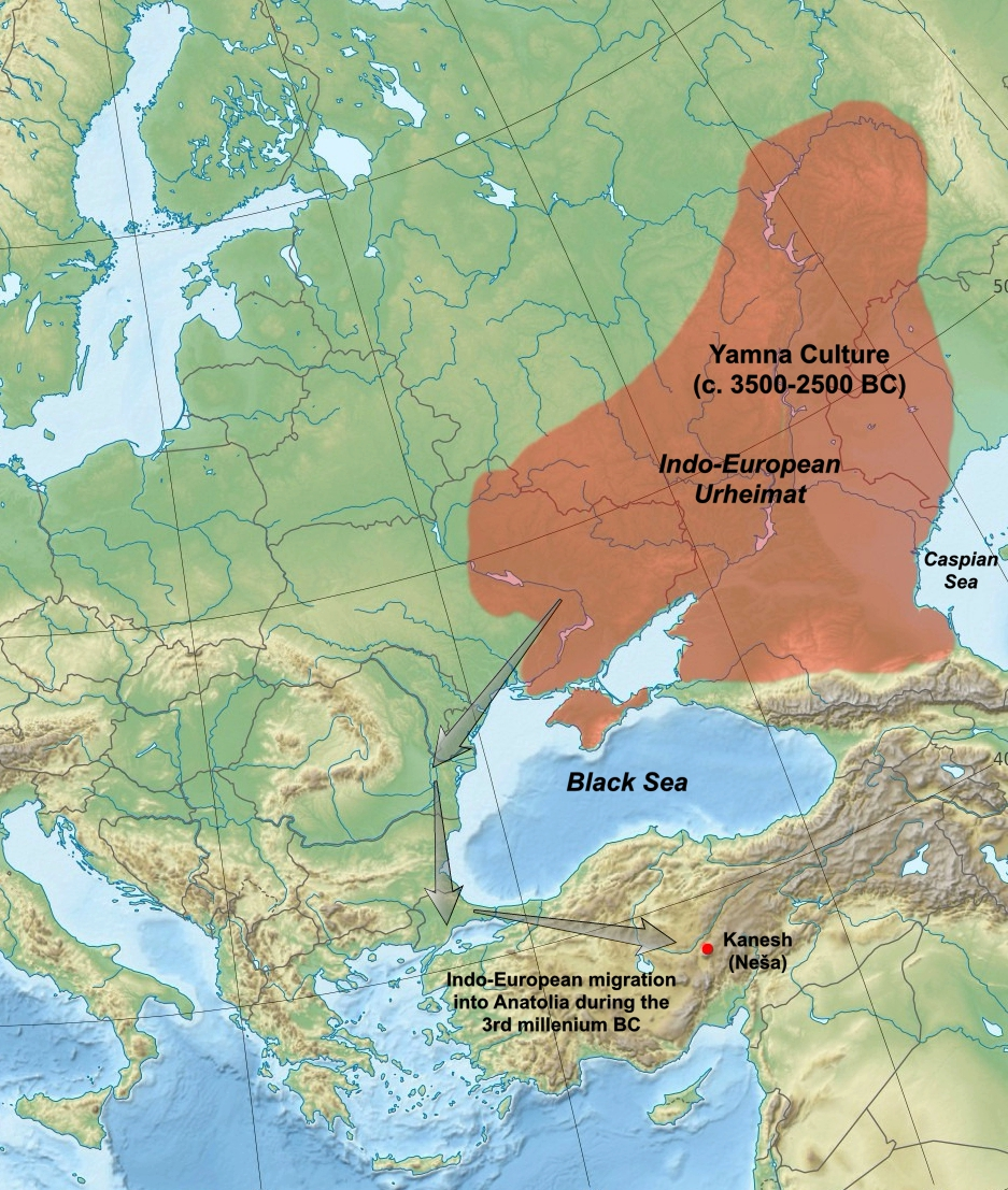 Map of the Indo-European migration to Anatolia